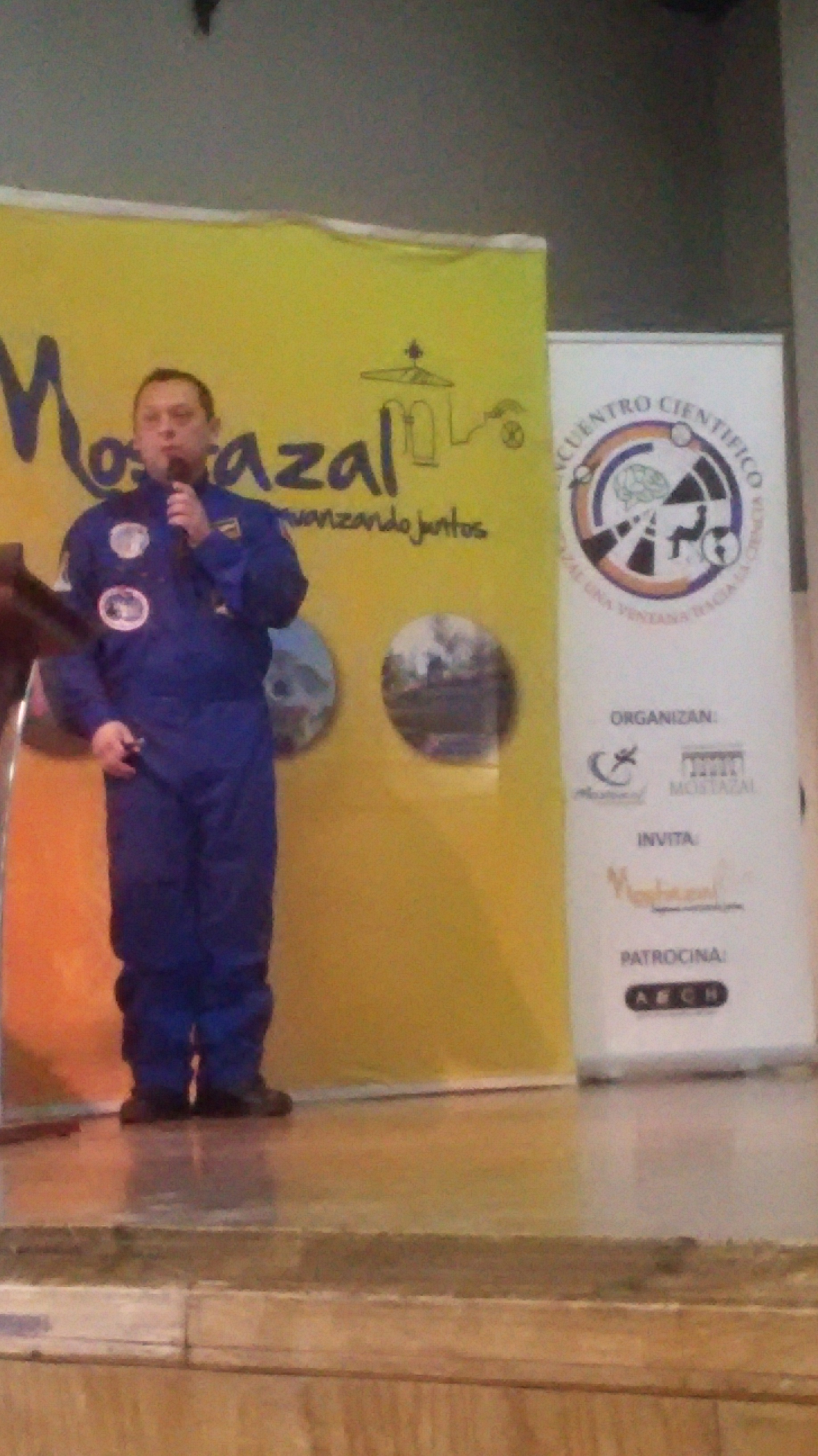 I Encuentro científico en el Teatro Municipal de San Francisco de Mostazal entre el 28 al 30 de Julio, organizado por la I. Municipalidad de San Francisco de Mostazal y patrocinada por la Asociación Escéptica de Chile. Inicio de la Escuela de Astronautas para niños.